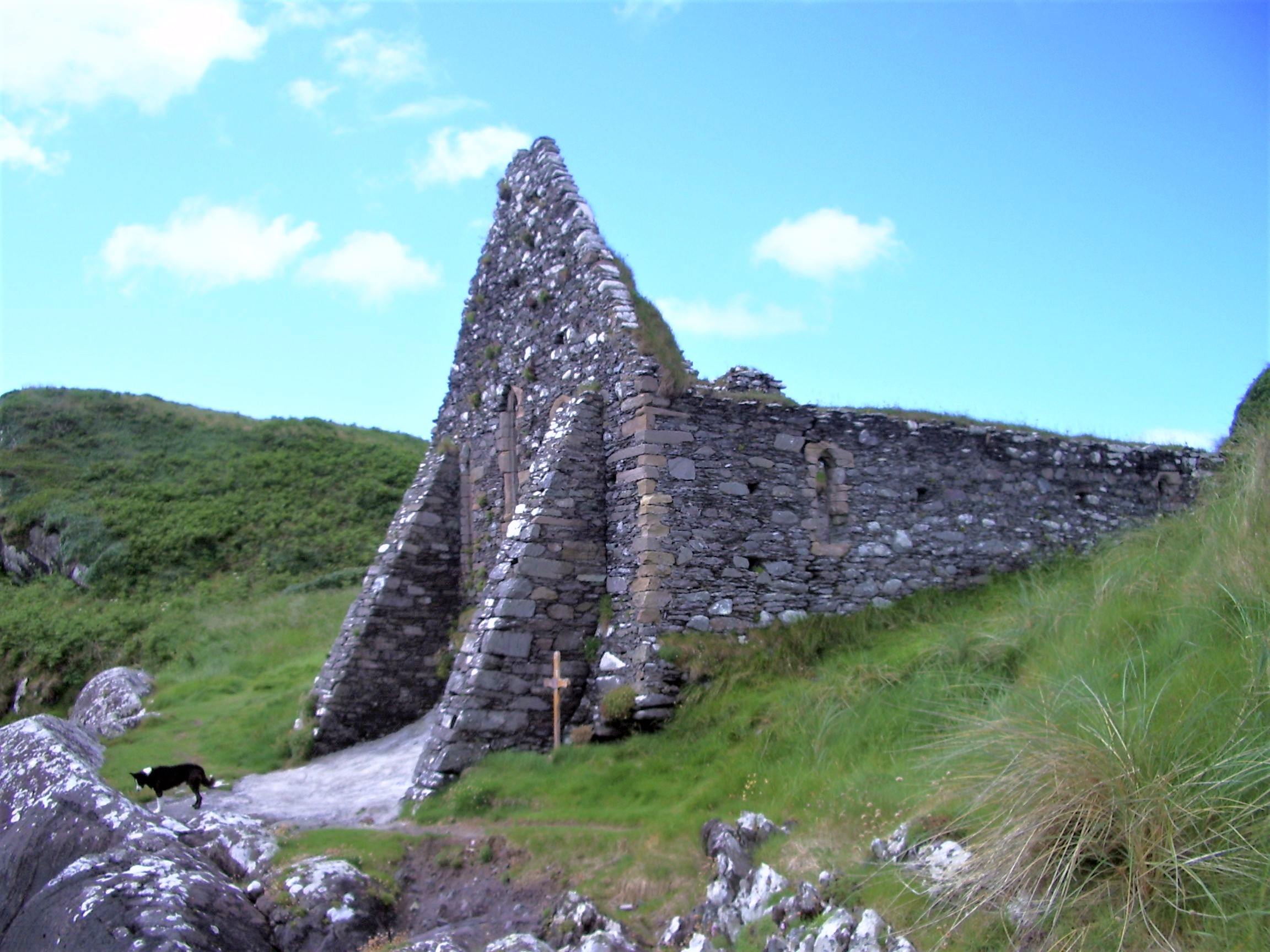 Ruine der Derrynane Abbey (in Irland)